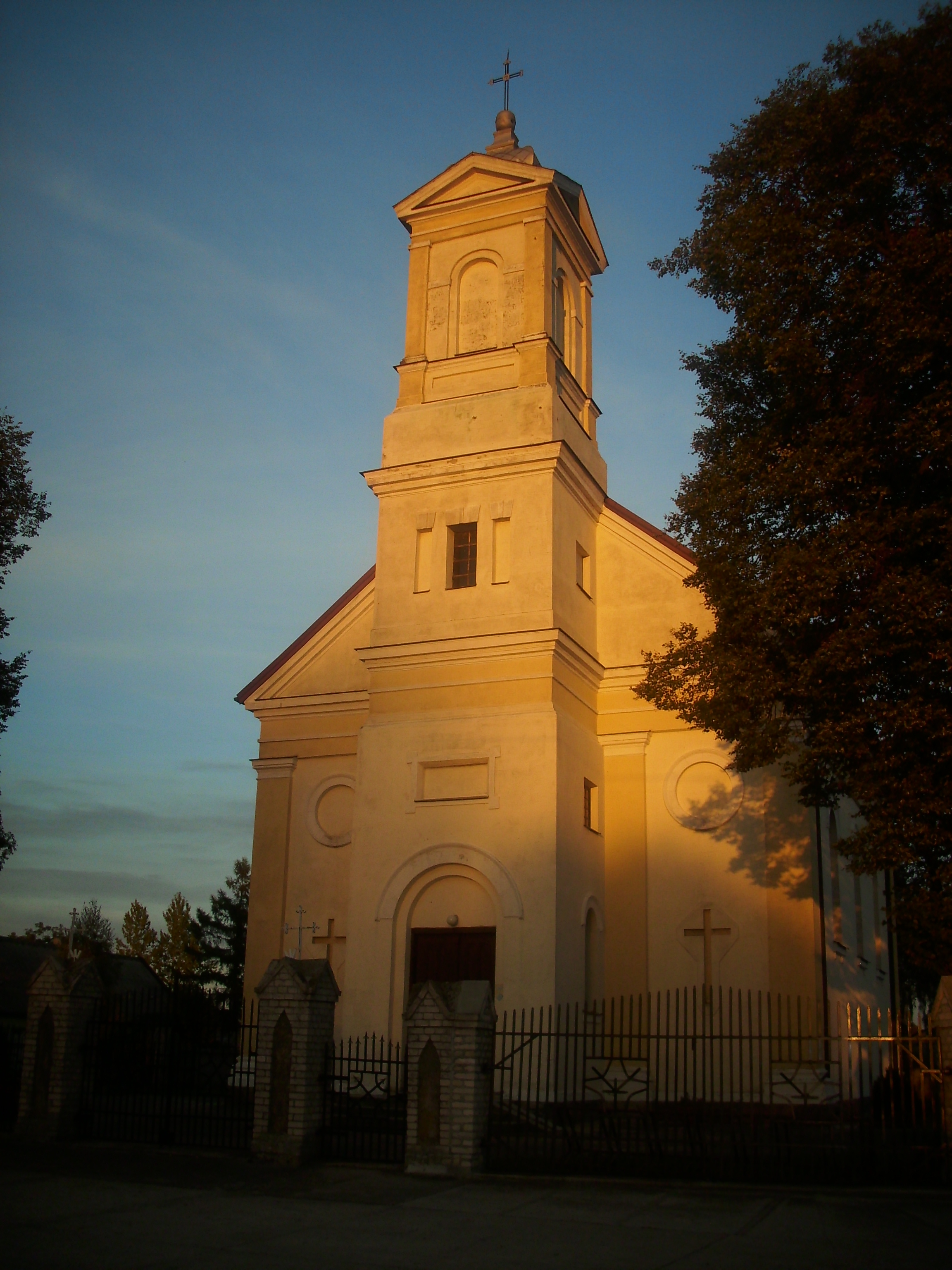 Bronisław - kościół parafialny pw. św. Bartłomieja, 1870-1876 (zabytek nr 330/A)